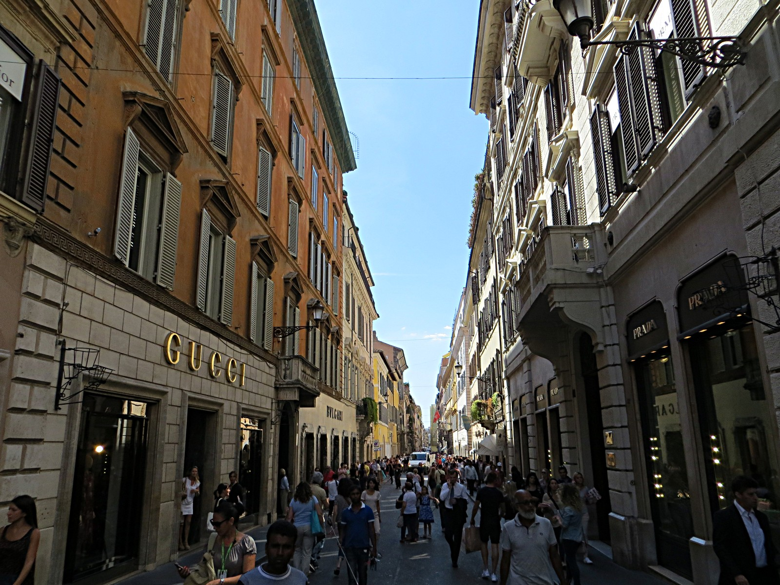 Via dei Condotti